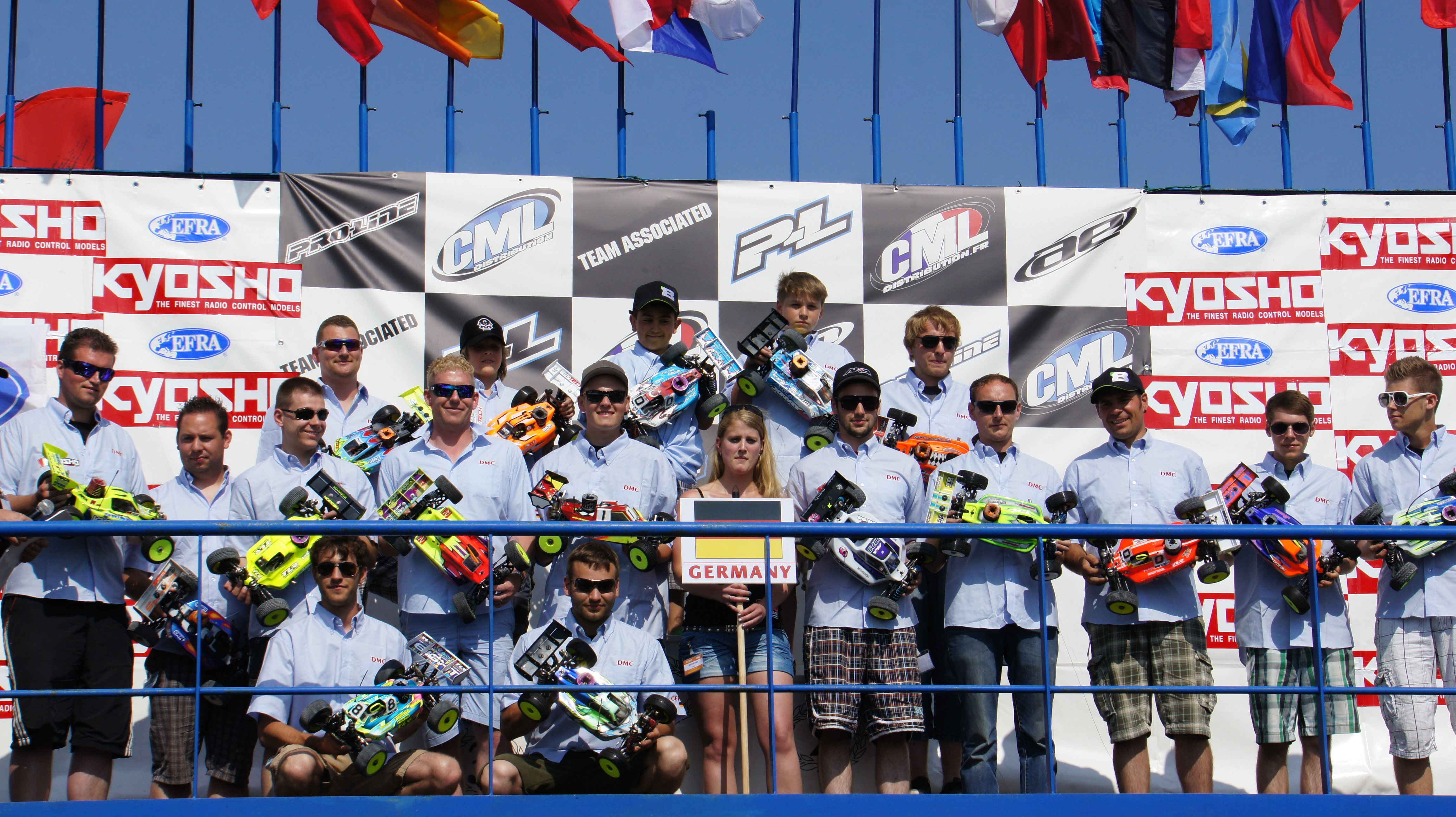 Lors du championnat d'Europe EFRA 2013 à Reims.